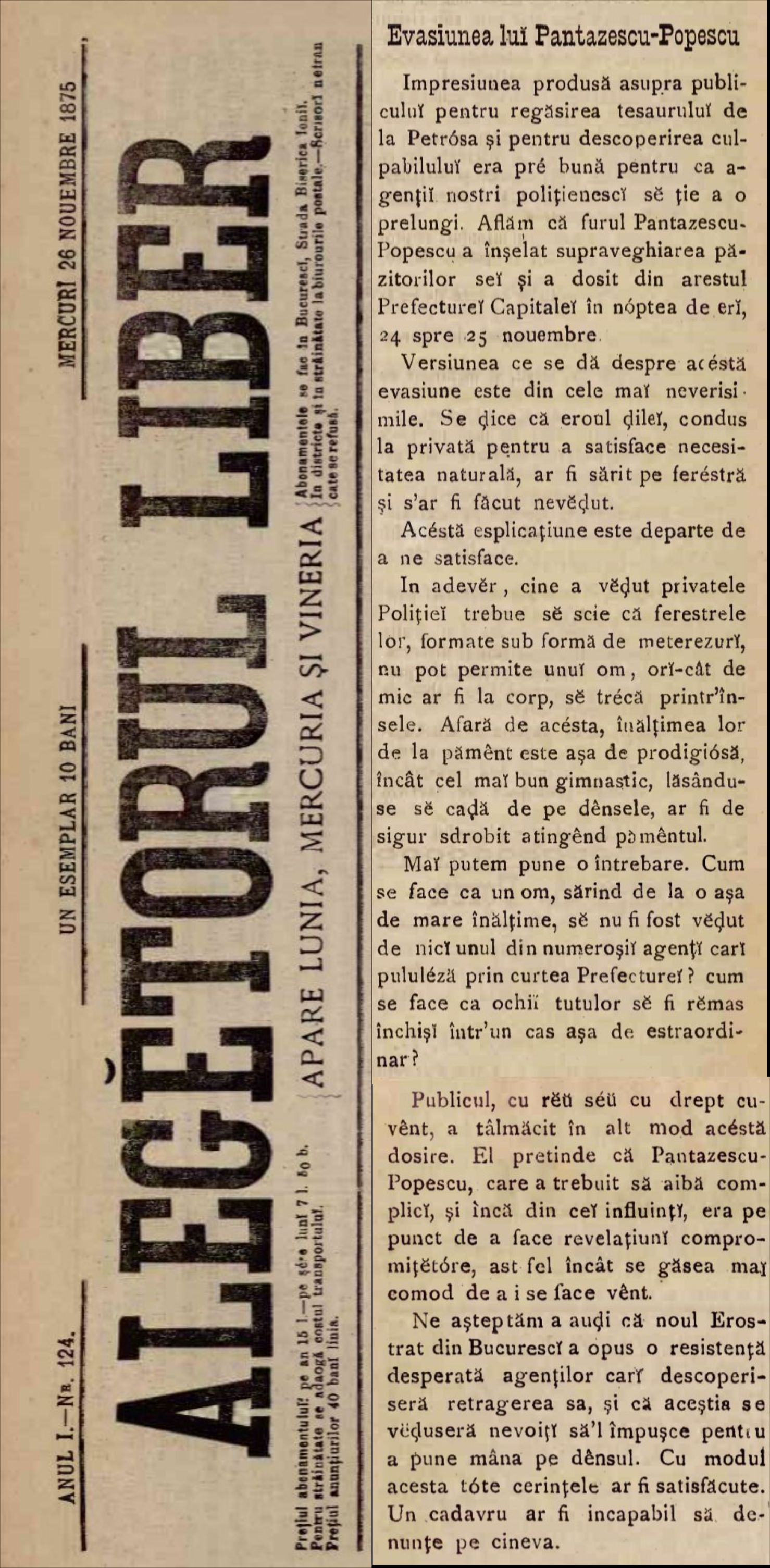 Evasiunea lui Pantazescu-Popescu - Extras din ziarul Alegătorul liber apărut în ziua de 26 noiembrie 1875 cu autor necunoscut